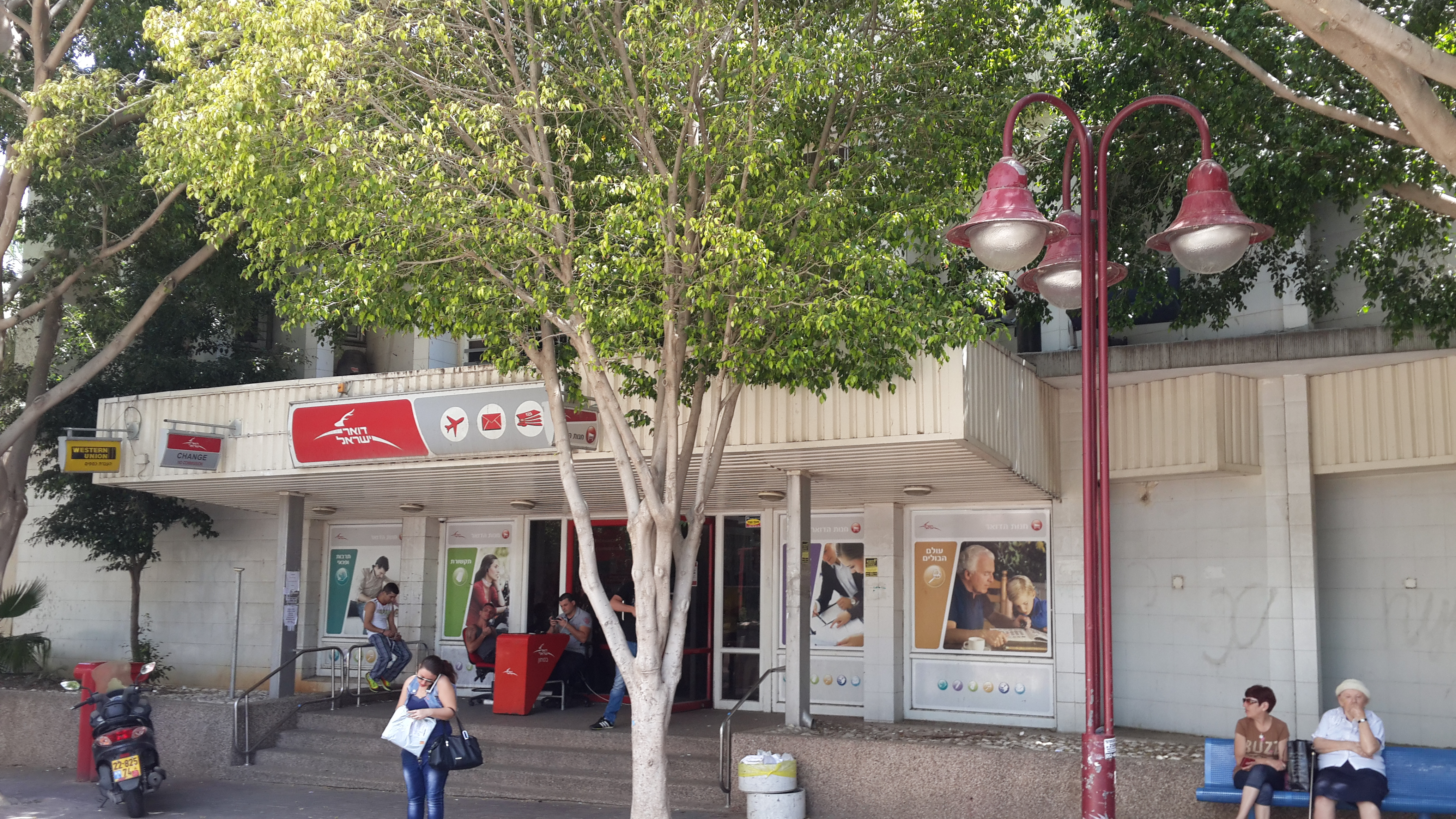 Главпочтамт в Петах Тикве